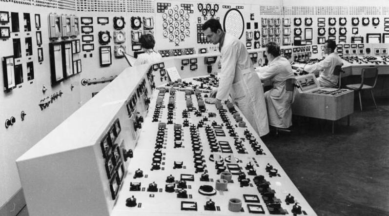 VEB Atomkraftwerk Rheinsberg Zentralbild/Kohls, 6.5.1966 VEB Atomkraftwerk Rheinsberg. Blick in die Blockwarte des ersten Atomkraftwerks der DDR bei Rheinsberg. Die Blockwarte ist das "Gehirn" des Kernkraftwerkes. Von hier aus werden insbesondere der Reaktor mit seinen Anlagen und das Turboaggregat gesteuert.